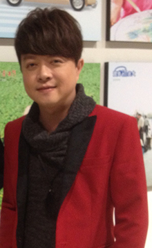 翁立友在三立電視。